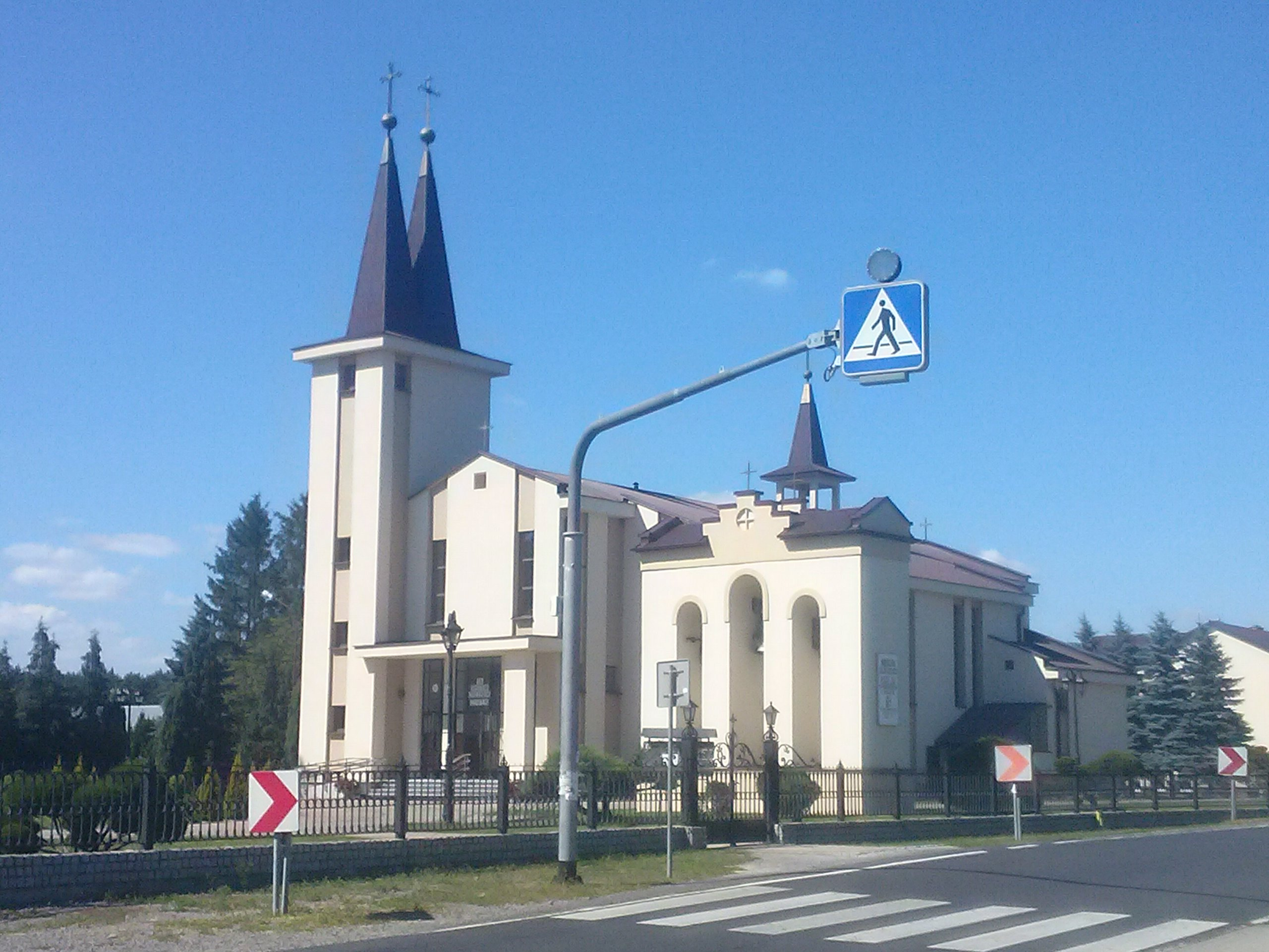 Kościół parafialny pw. św. Stanisława Biskupa w Wólce Pełkińskiej